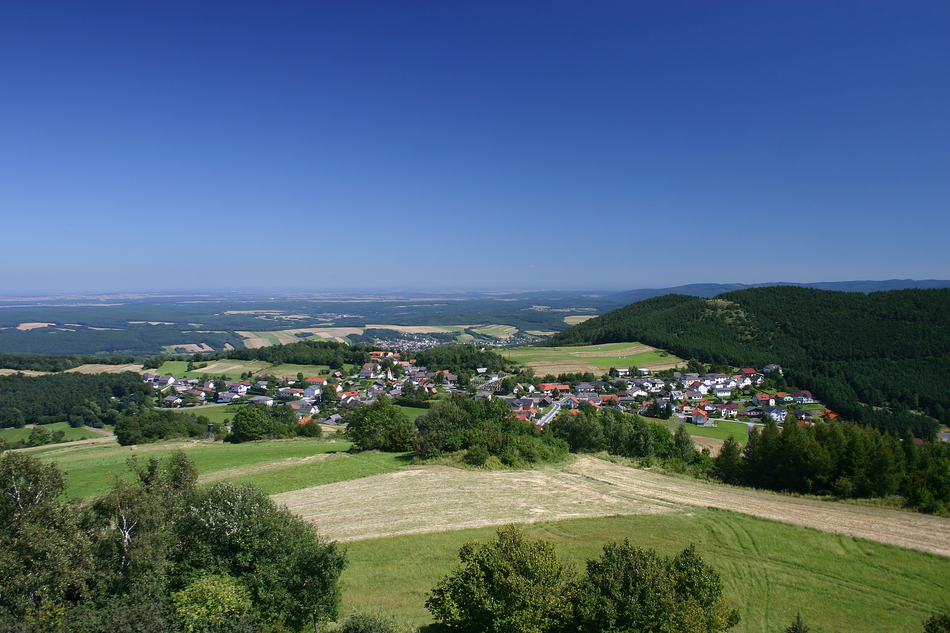 Redlschlag Panorama, im Hintergrund die Gemeinde Pilgersdorf – der Blick reicht bis zum Neusiedler See und in die Pannonische Tiefebene